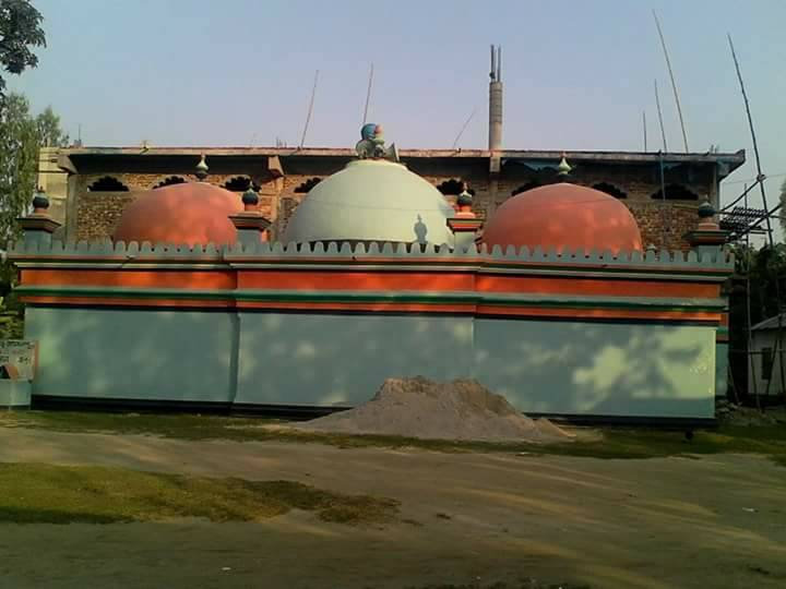 বাংলাদেশের হাজার বছরের ঐতিহ্যের নিদর্শন স্বরূপ মাথা উঁচু করে দাঁড়িয়ে আছে গাইবান্ধা জেলার সাদুল্লাপুর উপজেলার অন্তর্গত বড় জামালপুর শাহী মসজিদ।